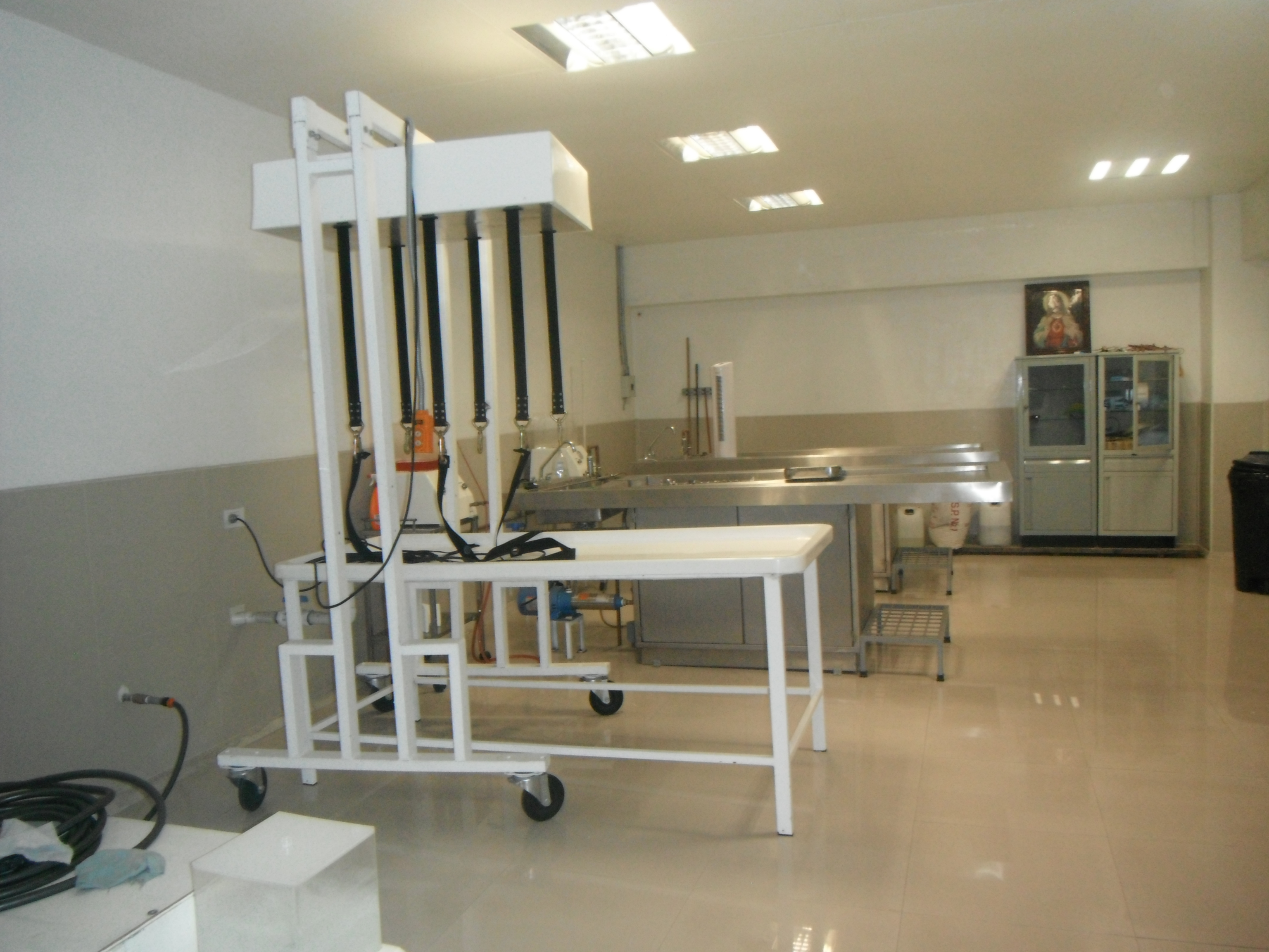 AREA para embalsamar